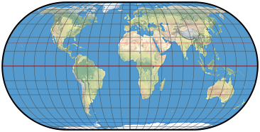 eckert 4